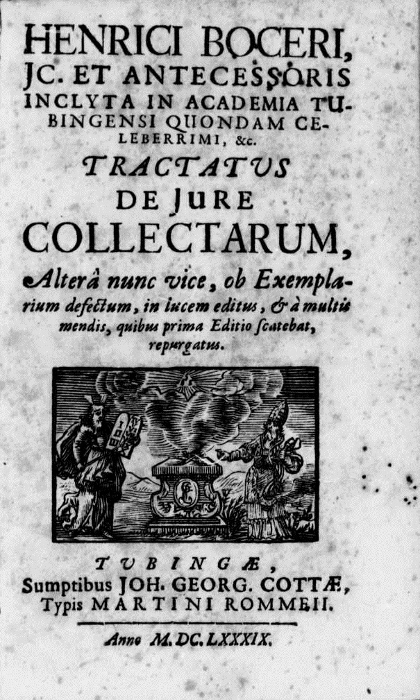 Frontespizio